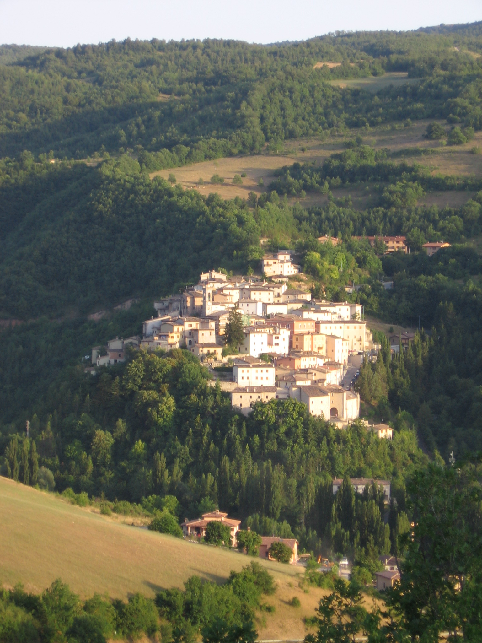 zelfgemaakte foto